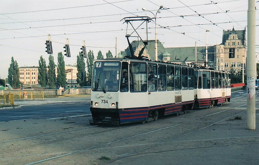 Tramwagen Bauart Konstal 105Na in Stettin Nähe Hauptbahnhof.